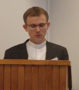 ks. Ireneusz Lukas podczas obrony swojego doktoratu